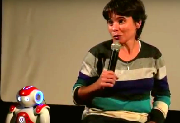 Elena Lazkano eta Nao robota. Zientzia Club-eko aurkezpenean 2014an